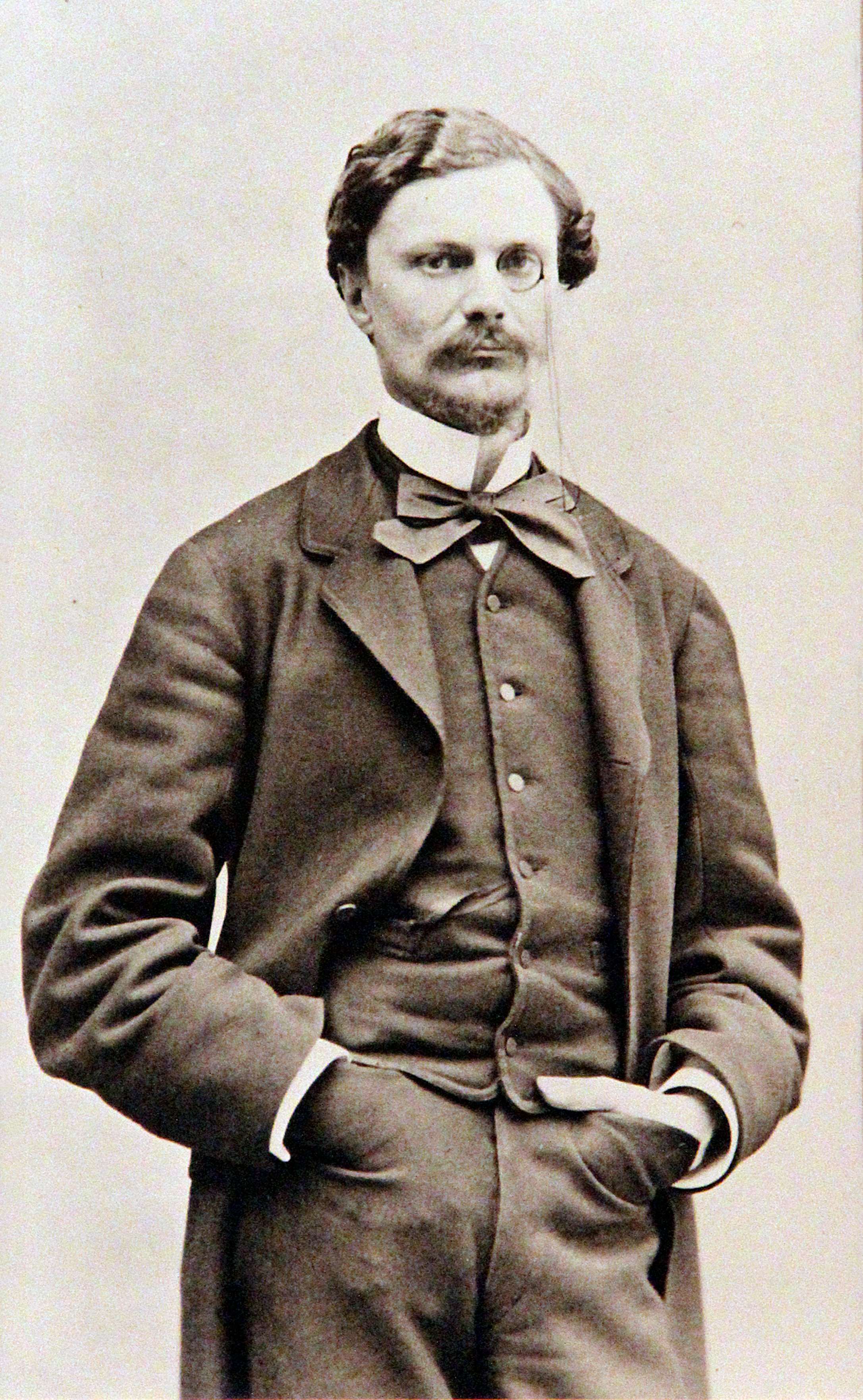 Alfred Sommier, photographie réalisée vers 1872 par un auteur inconnu, faisant partie des collections exposées dans le château de Vaux-le-Vicomte - Maincy (Seine-et-Marne, France).